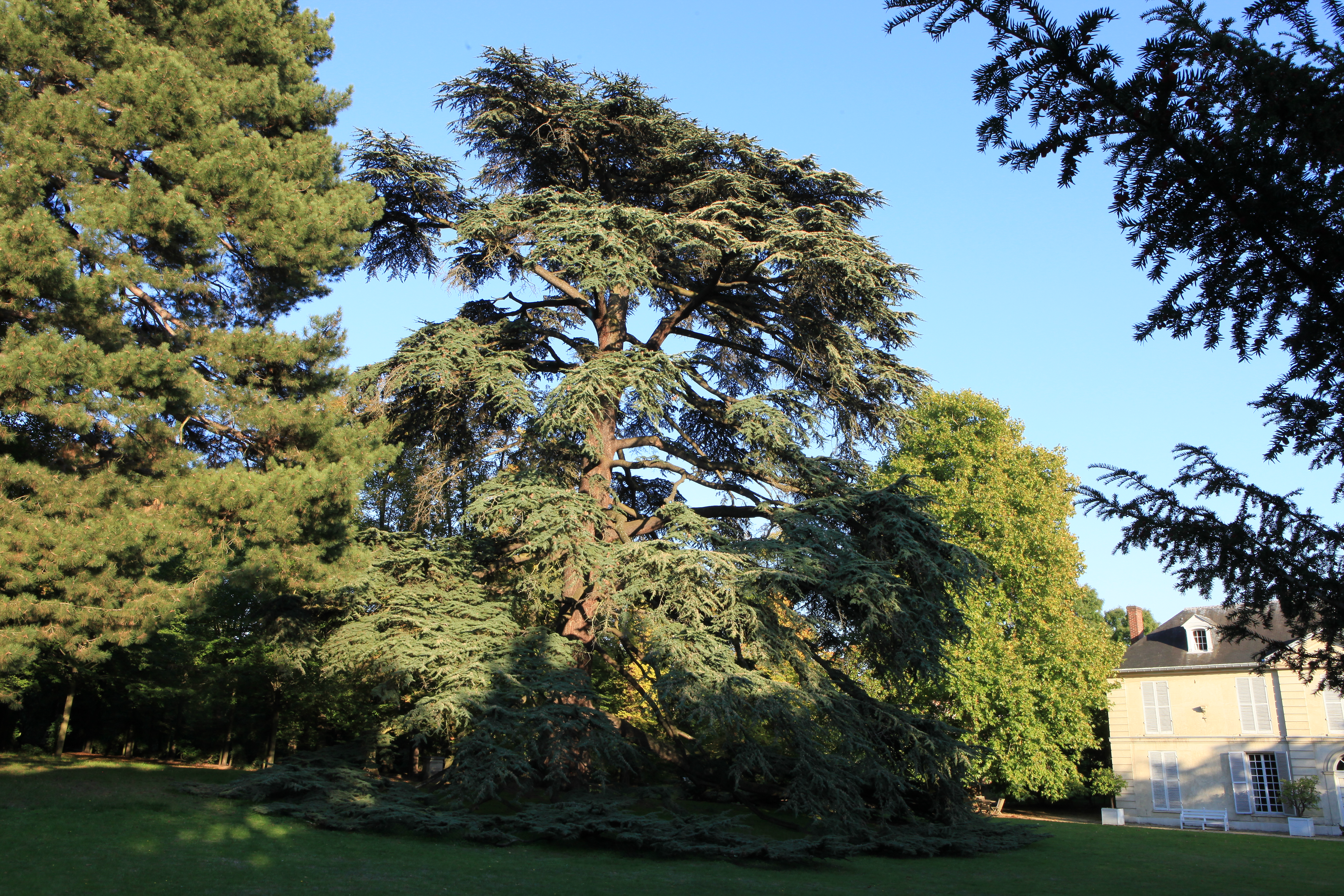 Pin Vilmorin